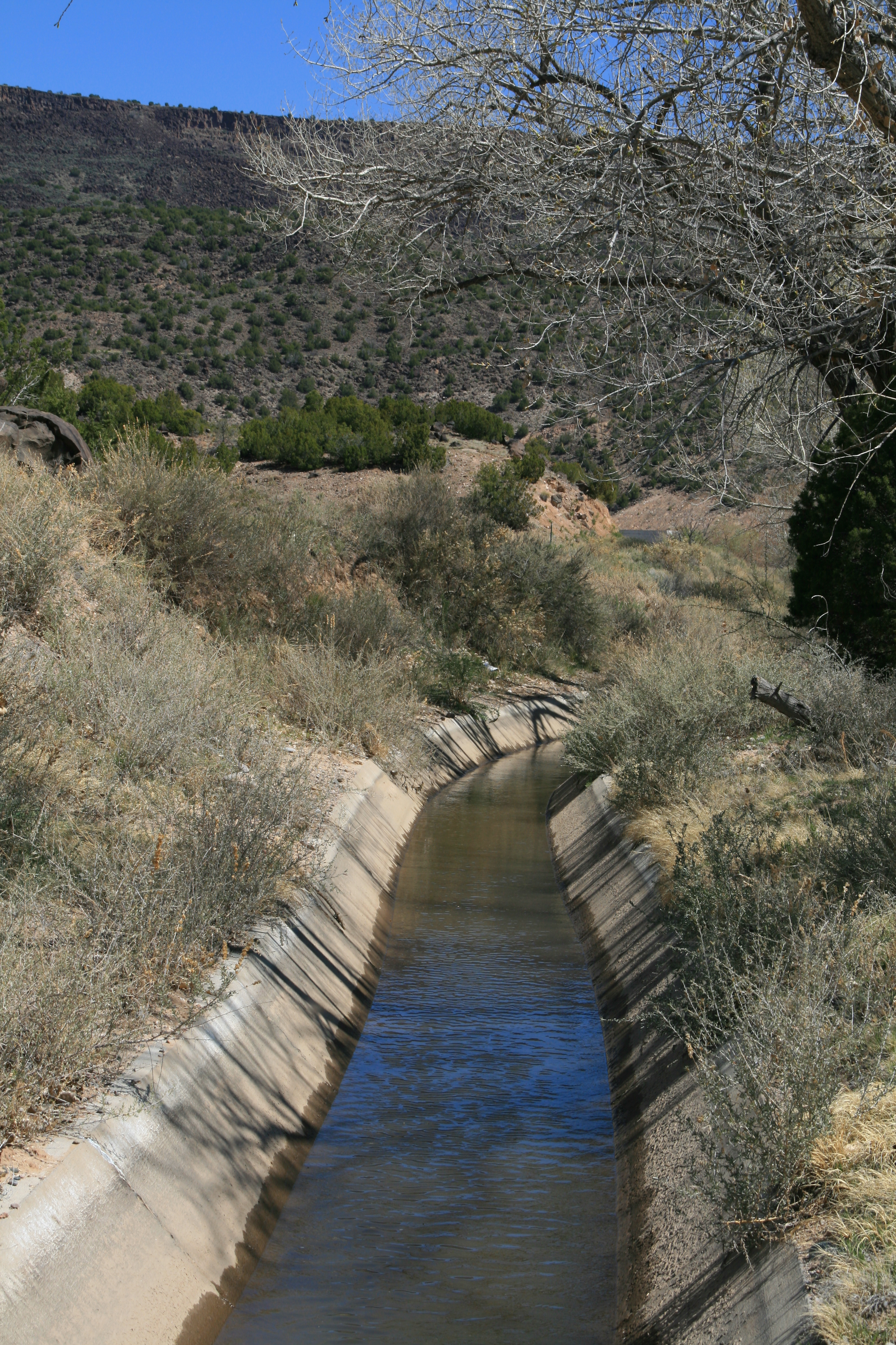 La Canova acequia, near Velarde, New Mexico